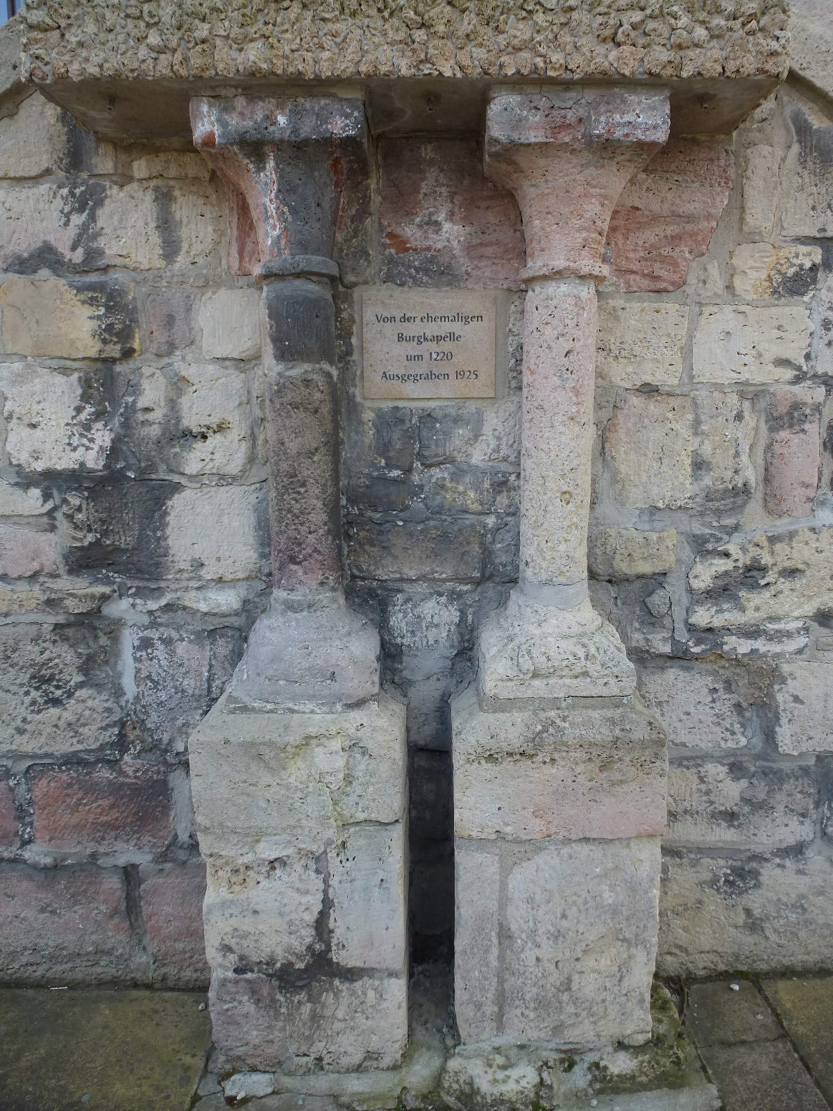 колонны, сохранившиеся от крепости Винтберг на Хаусберге у Йены, примерно 1200 г. Сейчас они вмонтированы в стену кафе у Фукстурма